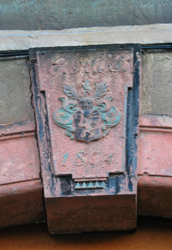 Wappen der Familie von Elterlein über dem Eingangsportal des Herrenhauses Pfeilhammer.